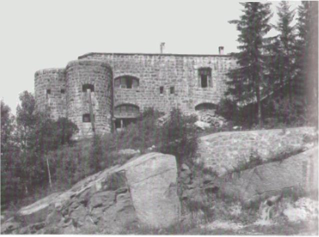 Fort Al Buso